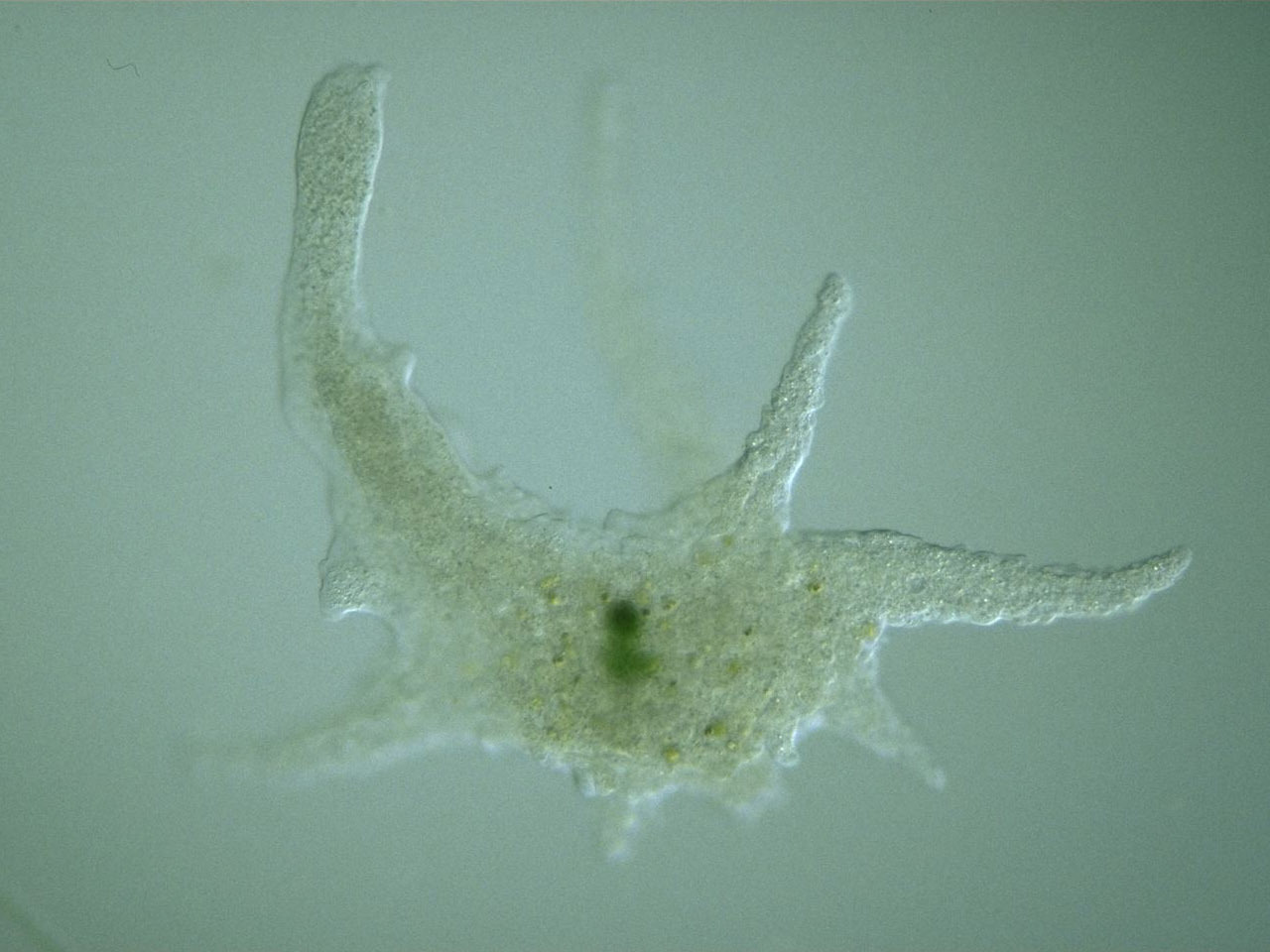 Protozoo Chaos carolinense